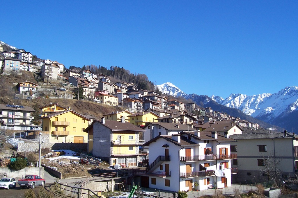 Cevo, panorama del paese, Val Camonica, Italia